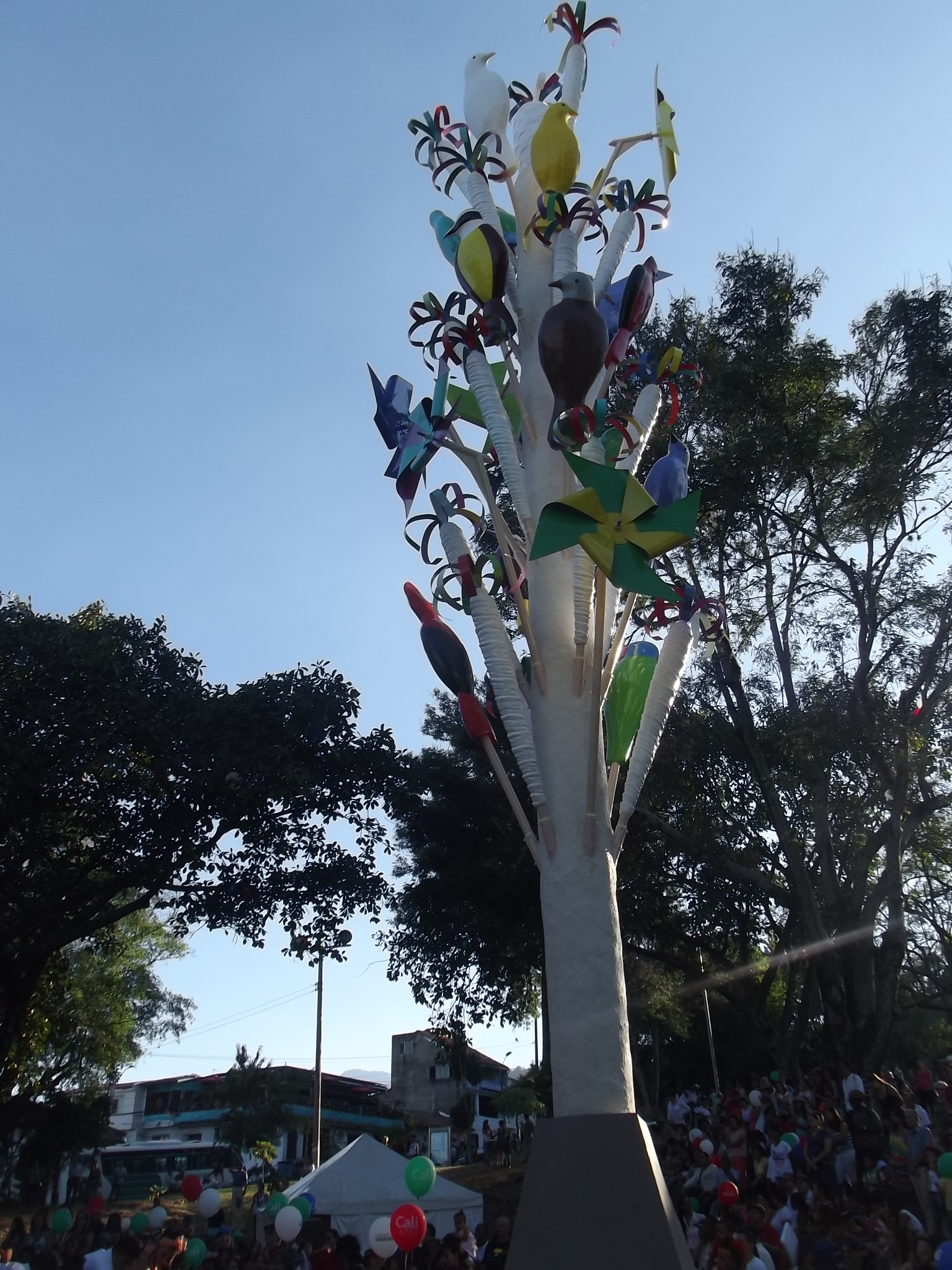 Monumento a la Maceta en San Antonio